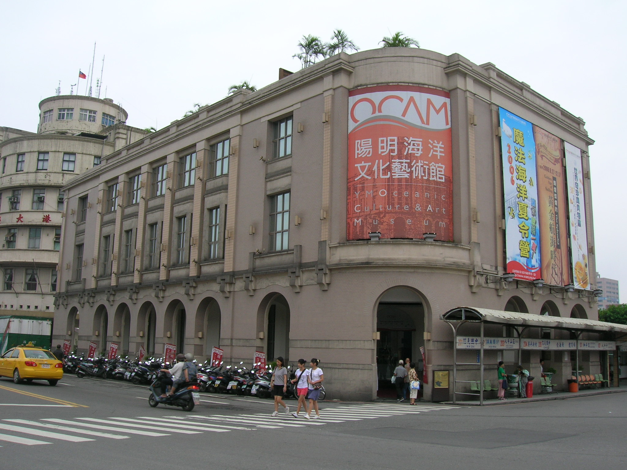 陽明海洋文化芸術館（旧陽明海運ビル）、日本統治時代の日本郵船基隆支店である。 中文（台灣）: 陽明海洋文化藝術館（陽明海運舊廈），日據時代為日本郵船基隆支店廳舍。